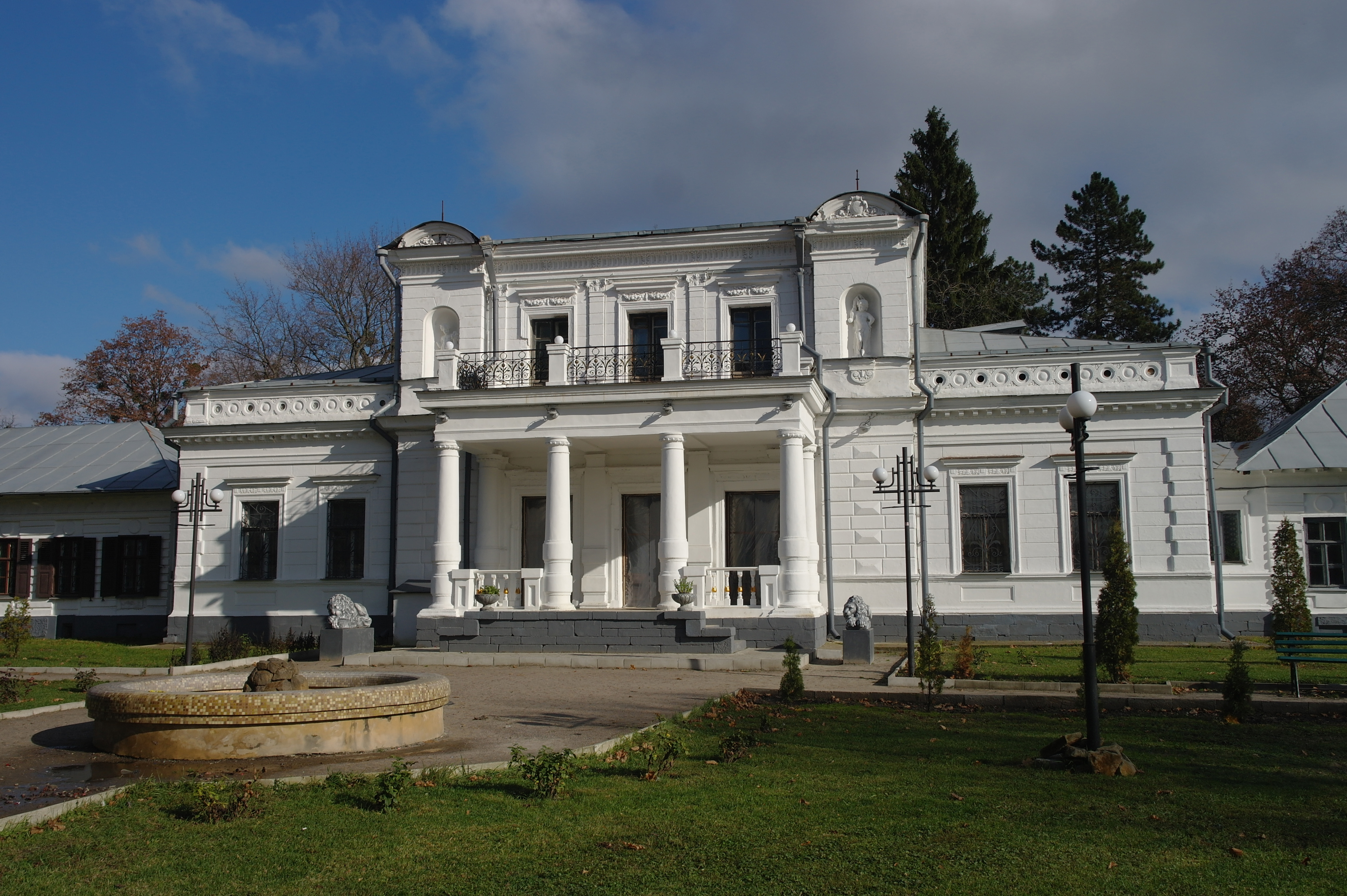 Садиба Л. Є. Кеніга, Тростянець, Сумська область